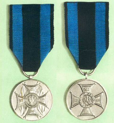 Srebrny Medal Zasłużonym na Polu Chwały (awers): wzoru z flagami i bez flag.